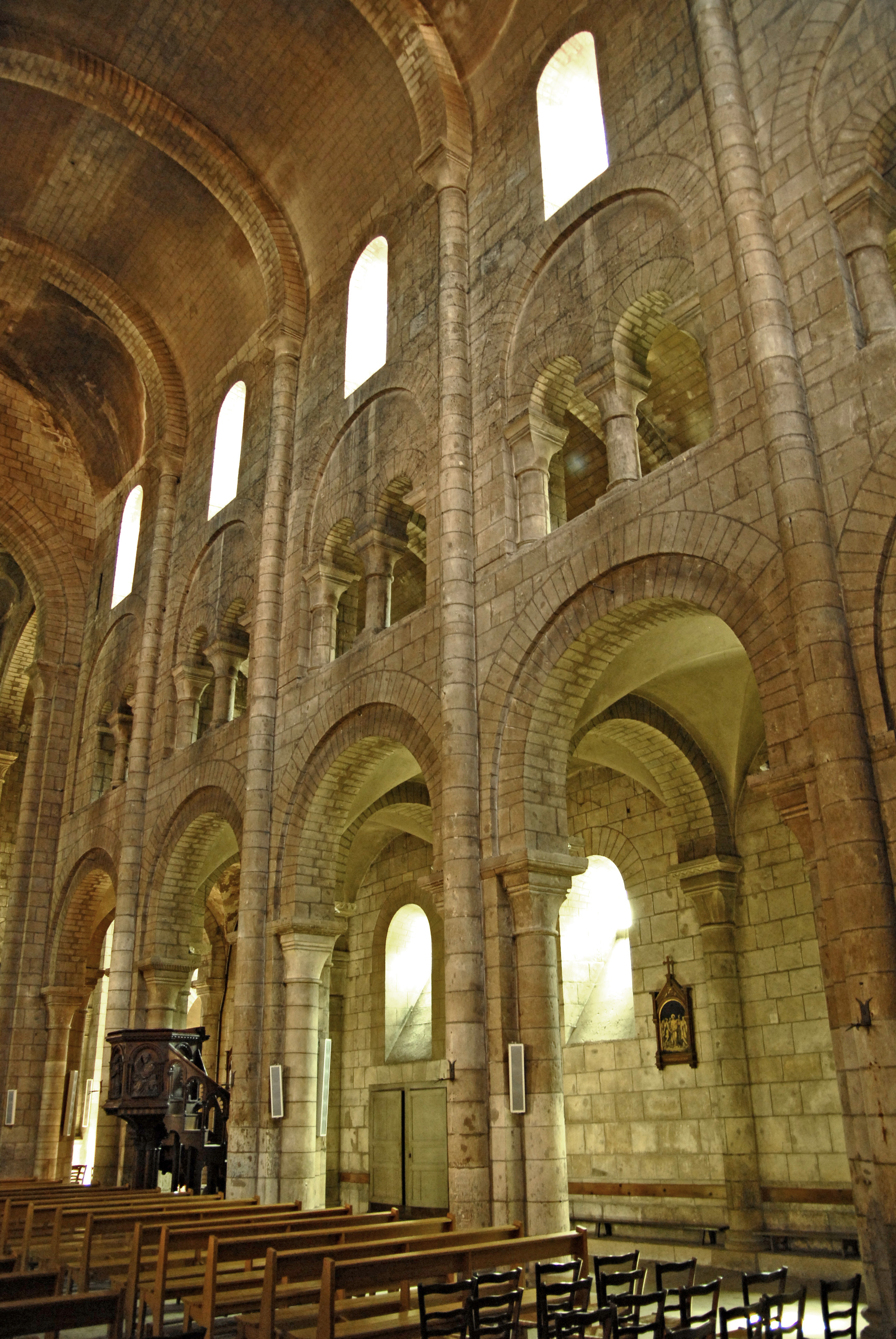 Saint-Etienne Nevers, Mittelschiff, südliche Seitenwand